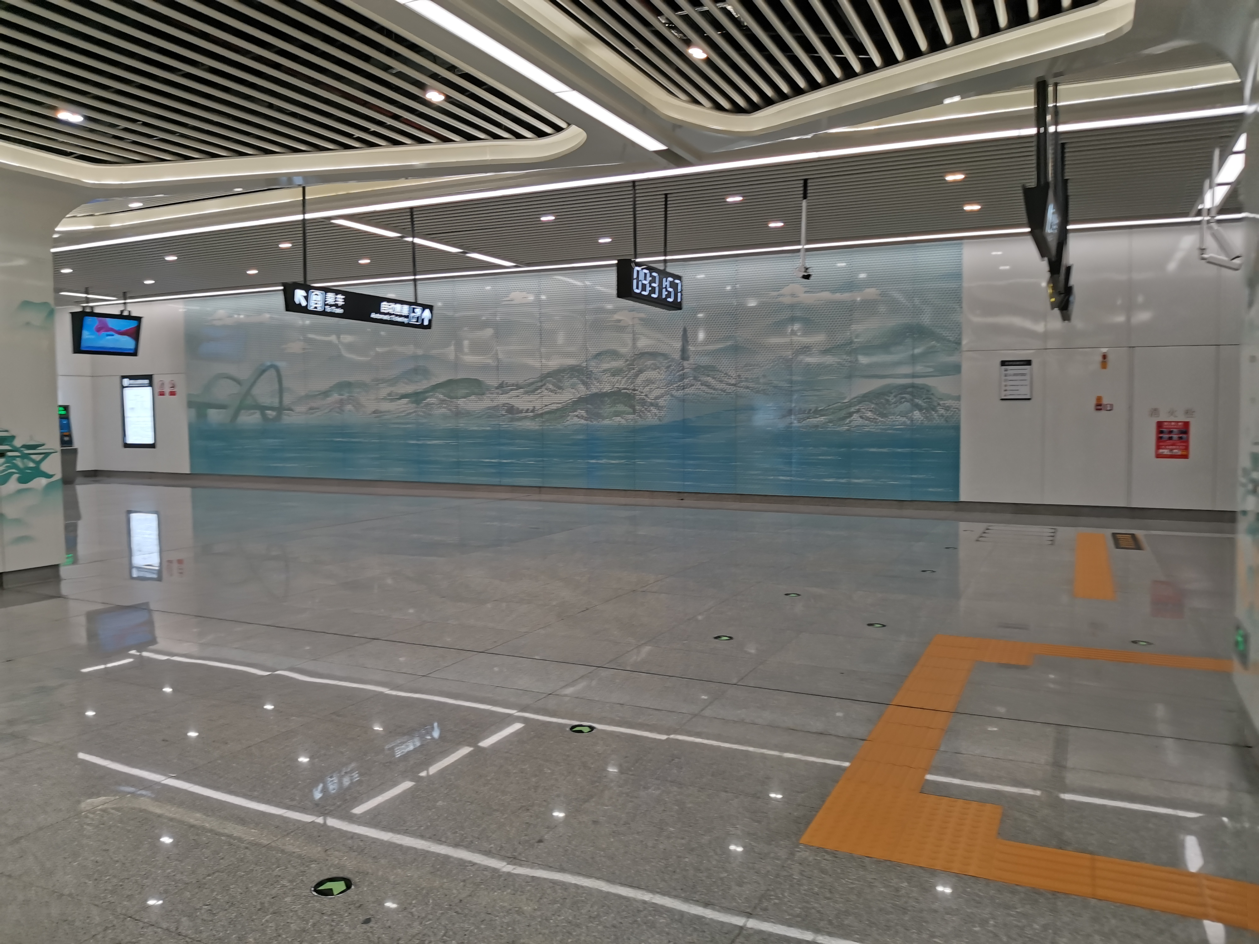 南宁轨道交通青秀山站站厅